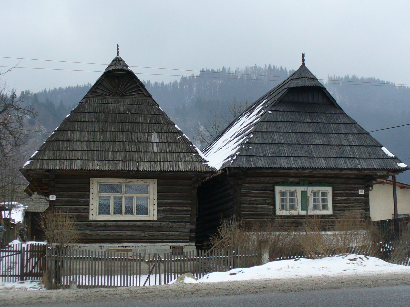 Podbiel (Orawa). Rezerwat architektury ludowej